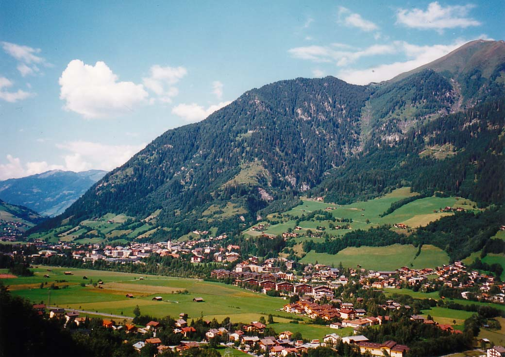 Bad Hofgastein